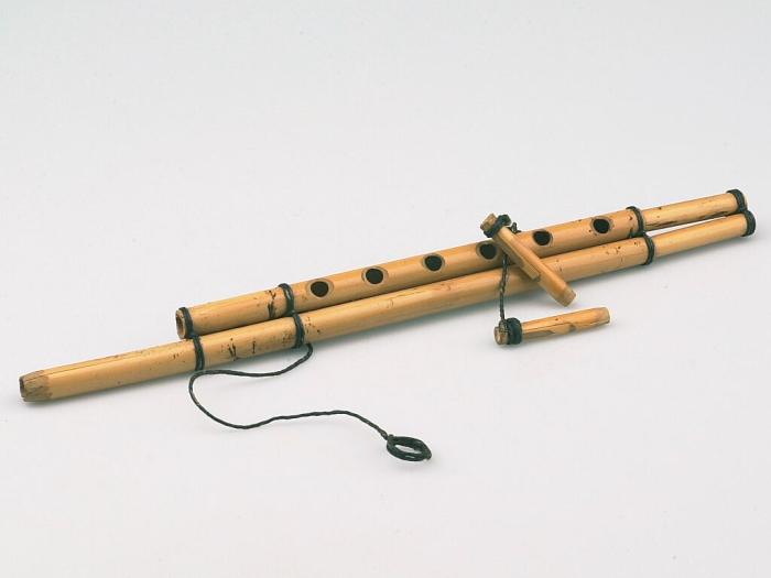 Dit meervoudige enkelriet (dubbel-klarinet) bestaat uit 2 bamboe buizen. De kortste buis heeft 6 vingergaten, hierop wordt de melodie voortgebracht. De langste buis heeft geen vingergaten en brengt slechts een toon voort (de 'bourdon'). De buizen zijn met plantaardig vezel aan elkaar gebonden. In het boveneinde van de buizen worden losse, 'idioglotte' 'rieten' gestoken, dwz. dat het tongetje uit het materiaal zelf (bamboe) gesneden is.